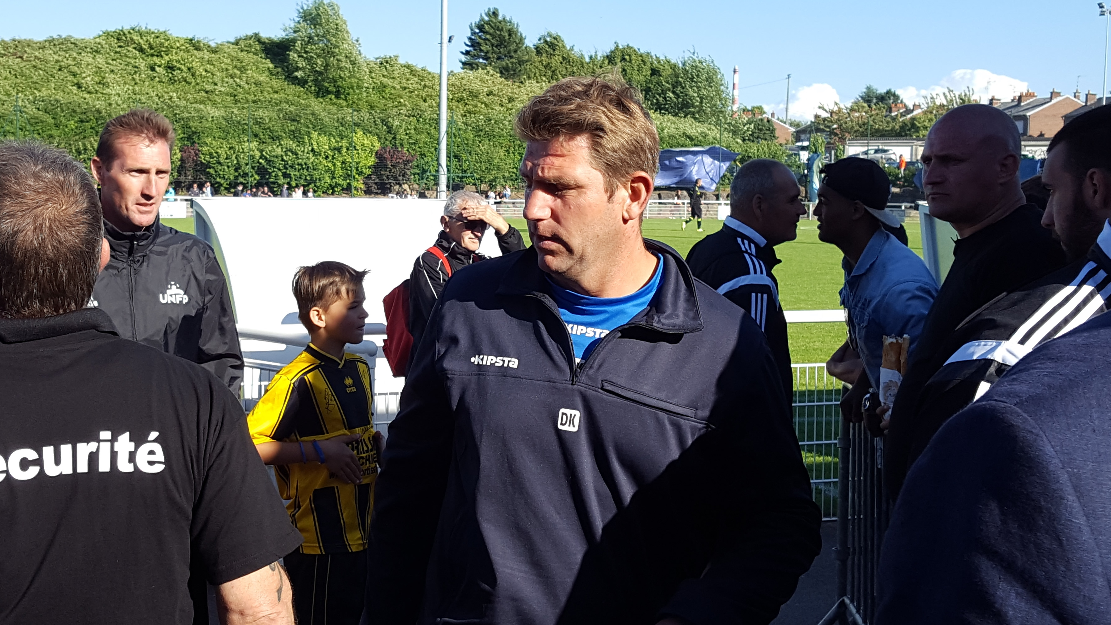 David Klein lors du match amical Valenciennes / UNFP FC, le 2 juillet 2016, au Stade des Navarres à Aniche.